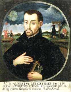 Polish Jesuit Wojciech Męciński